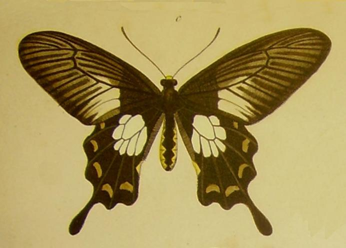 Papilio annae now [Pachliopta phlegon]